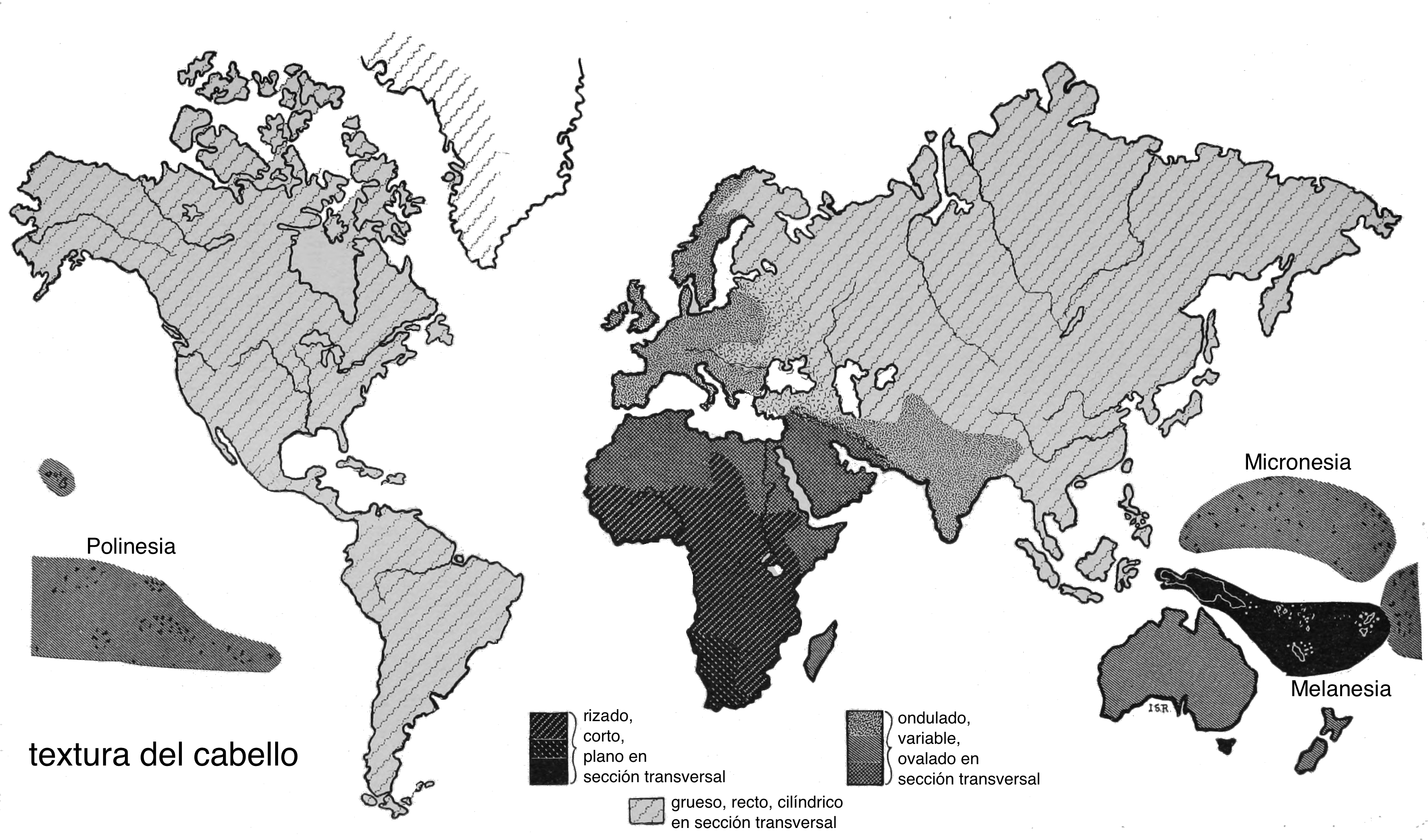 Este mapa es un mapa de la textura del cabello humano que se tradujo de inglés.versión original en inglés